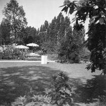 Bundesgartenschau 1957 in Köln - Hausgarten, Detail